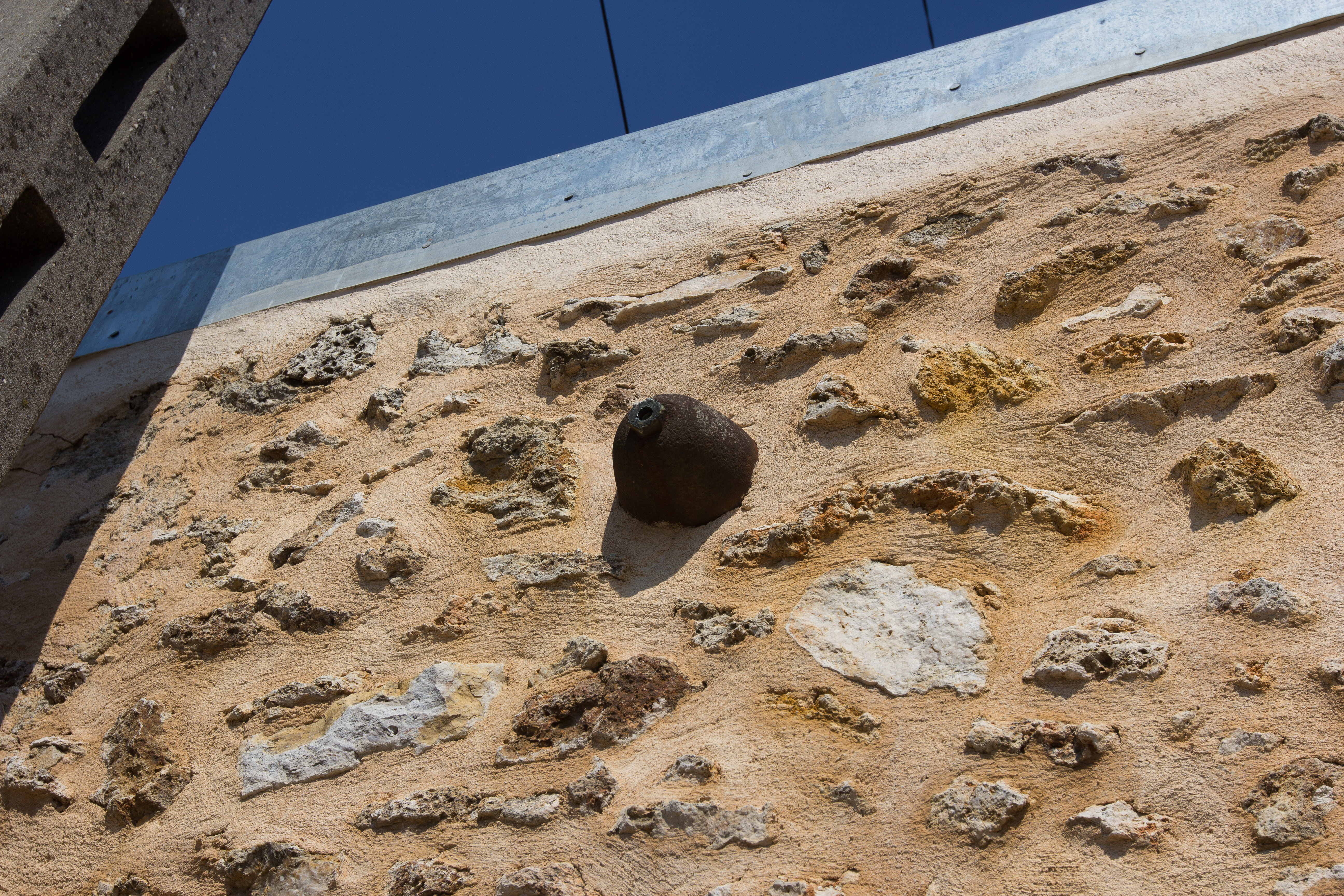 Ancienne ferme Nerhot, local du CCAS en 2015, obus de la guerre de 1870 dans le mur extérieur à gauche du porche / Villabé / Essonne / France